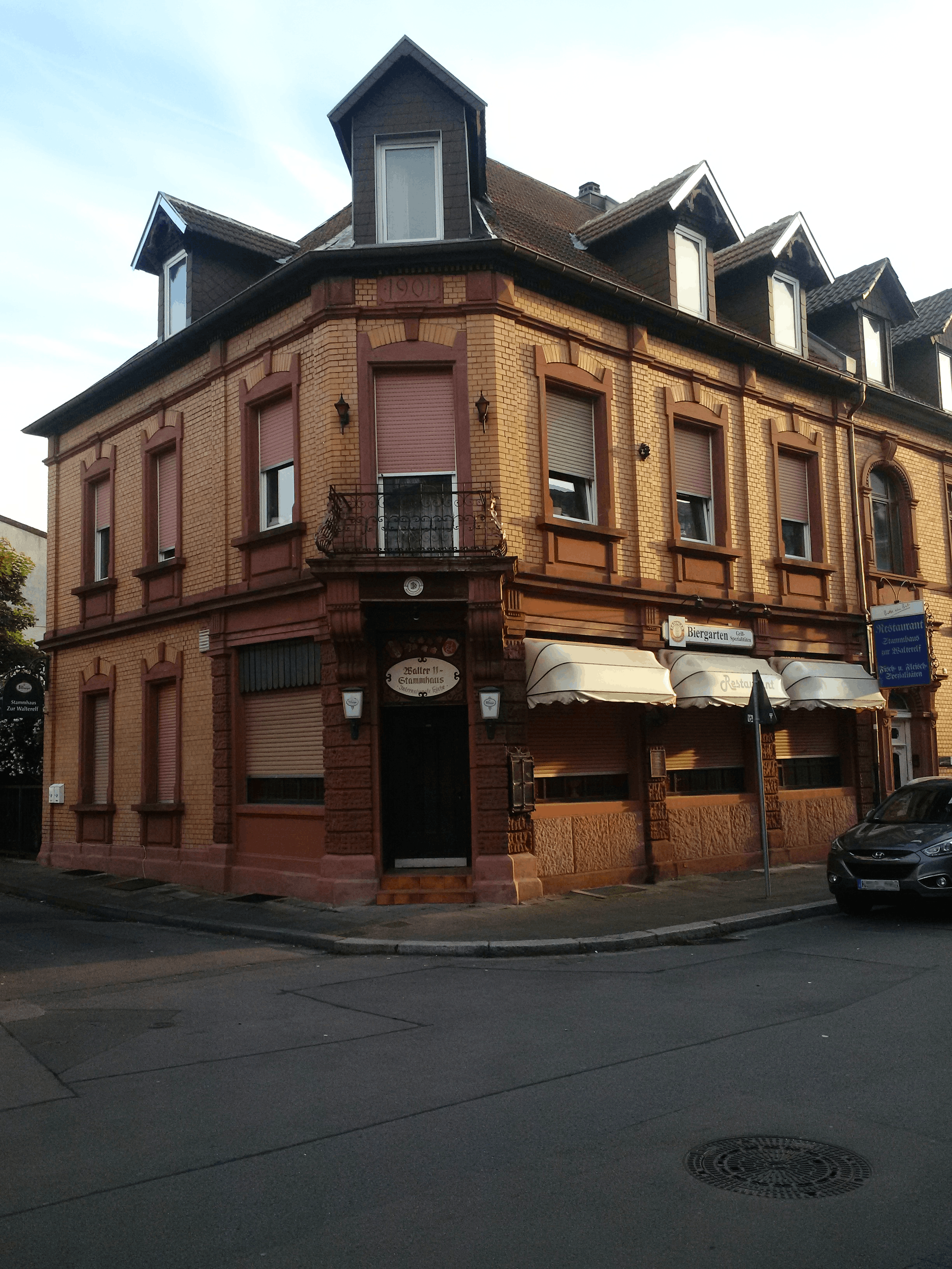 In diesem Haus, das heute eine Gaststätte ist, wurden die Brüder Ottmar und Fritz Walter geboren.